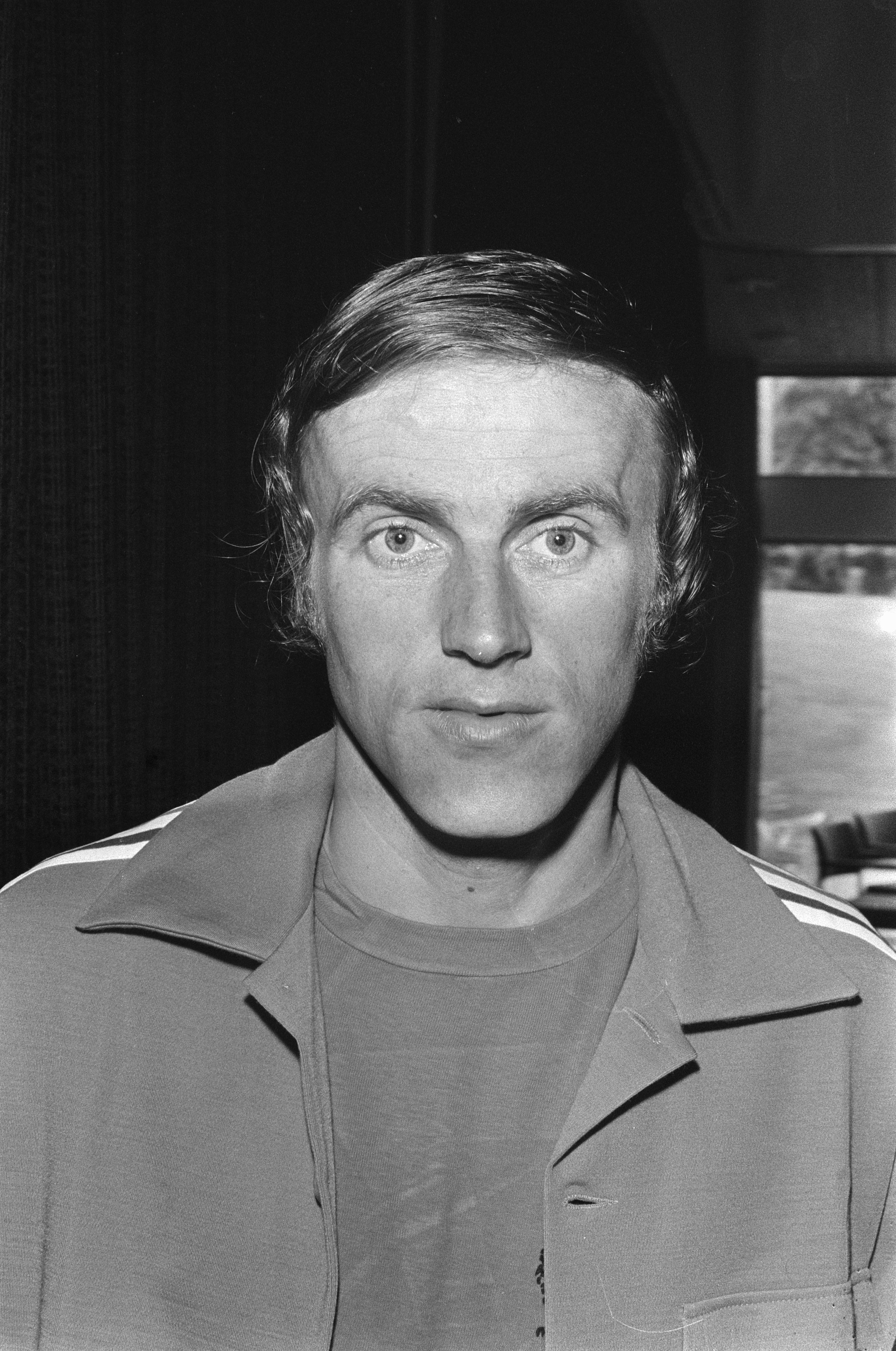 Collectie / Archief : Fotocollectie Anefo Reportage / Serie : [ onbekend ] Beschrijving : Selectie Nederlands elftal voor WK voetbal 1974 bijeen in Zeist; nr. 3a, Harry Vos , kop, nr. 4a, 5a Ruud Geels , kop Datum : 31 mei 1974 Locatie : Utrecht, Zeist Trefwoorden : elftallen, sport, voetbal Persoonsnaam : Geels, Ruud Fotograaf : Mieremet, Rob / Anefo Auteursrechthebbende : Nationaal Archief Materiaalsoort : Negatief (zwart/wit) Nummer archiefinventaris : bekijk toegang 2.24.01.05 Bestanddeelnummer : 927-2274